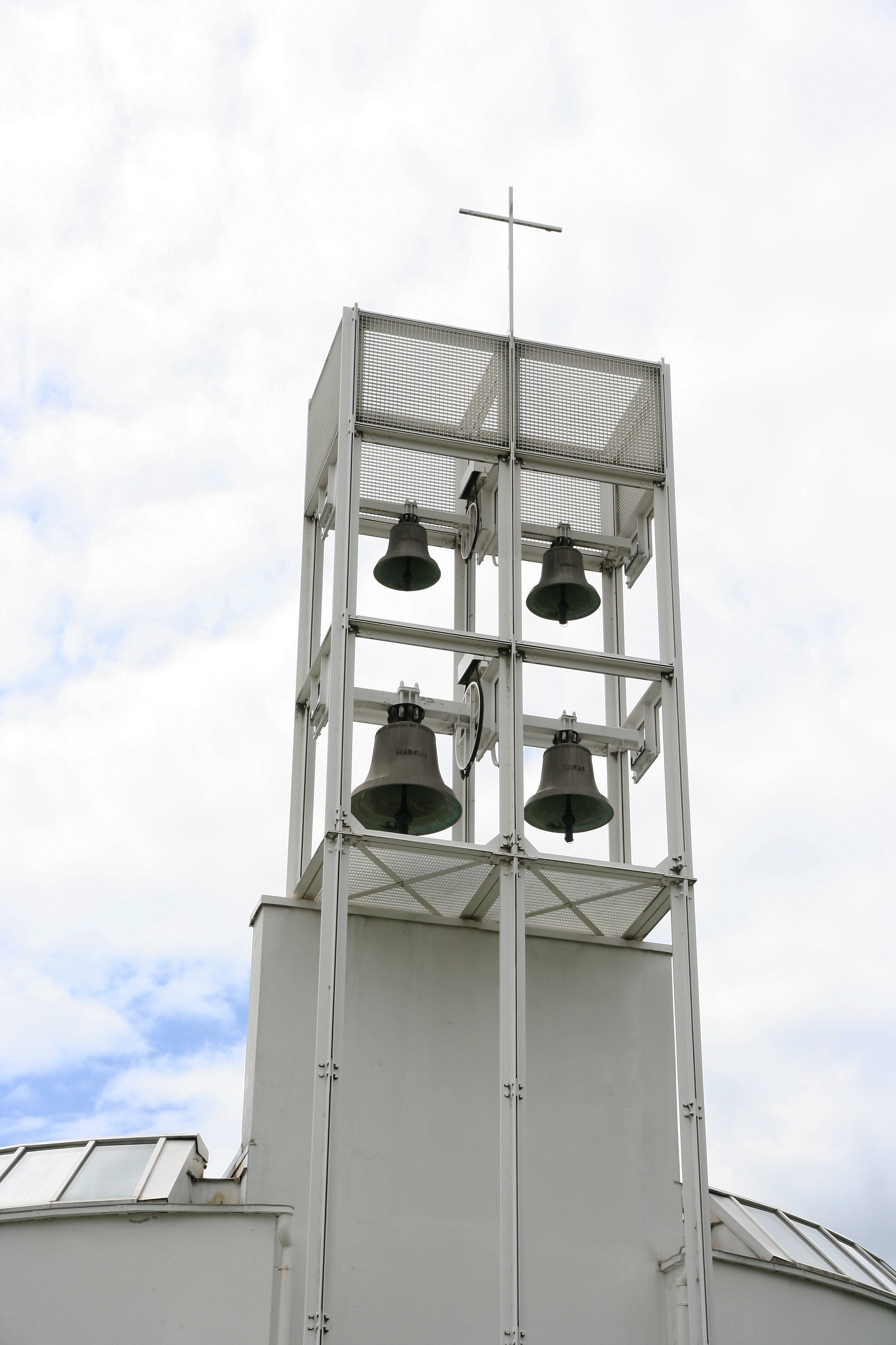 Römisch-katholische Kirche Heilig Chrüz Oberrieden ZH, Glocken